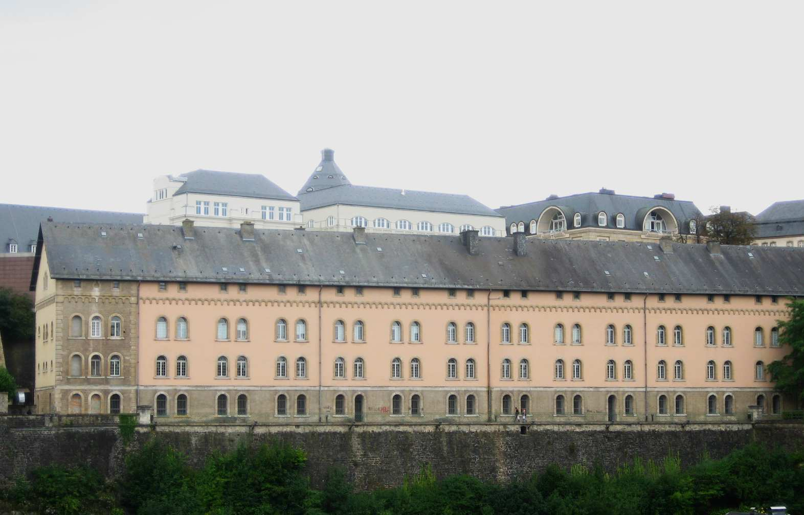 D'Lëtzebuerger Nationalarchiven, am August 2008, vun der Rumm aus gesinn.